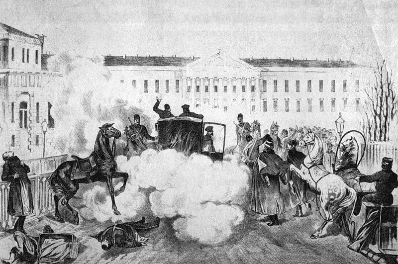 Набережная Екатерининского канала 1 марта 1881 года.